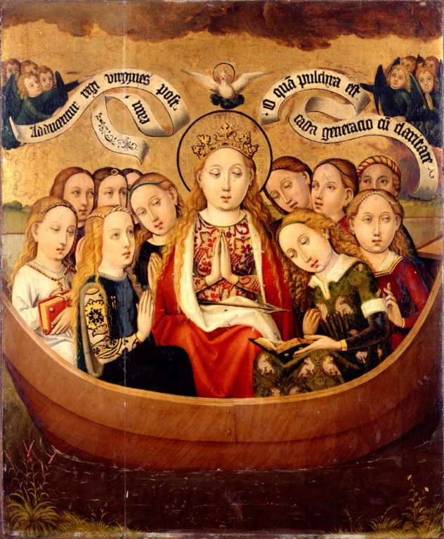 Descriptif : Ce panneau figure le voyage de sainte Ursule et de onze jeunes filles nobles le long du Rhin dans une barque. Scène finale du périple des Onze Mille Vierges.